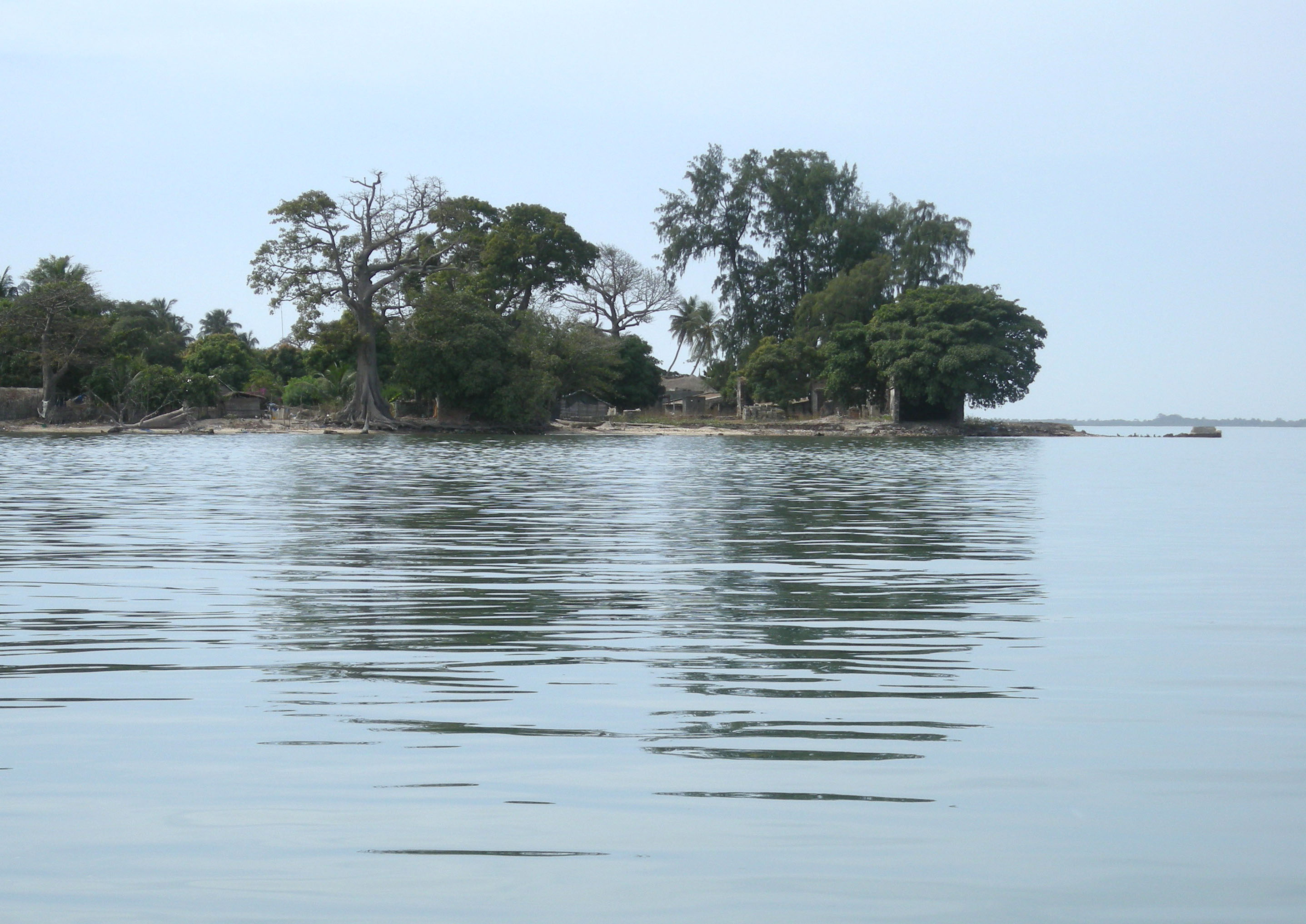 Arrivée en pirogue à l'île de Carabane (Casamance, Sénégal), en provenance d'Elinkine